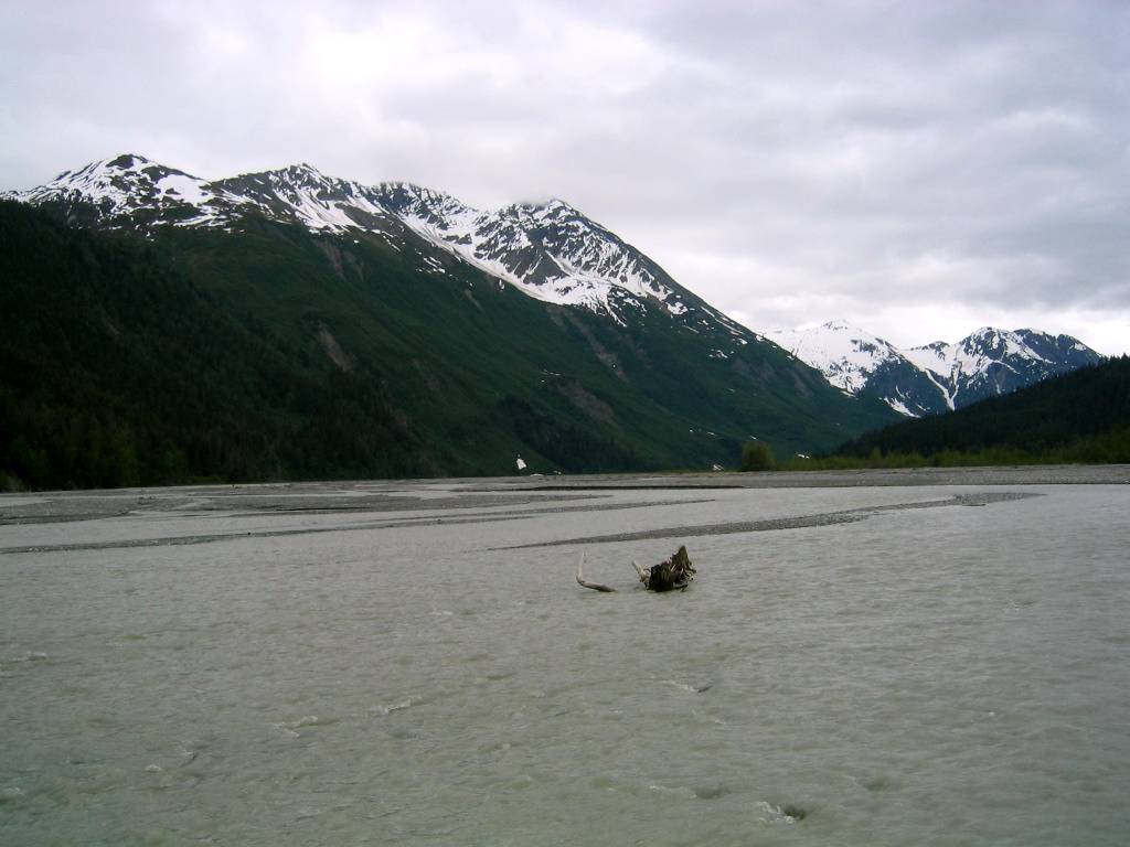 Tsirku River, Alaska